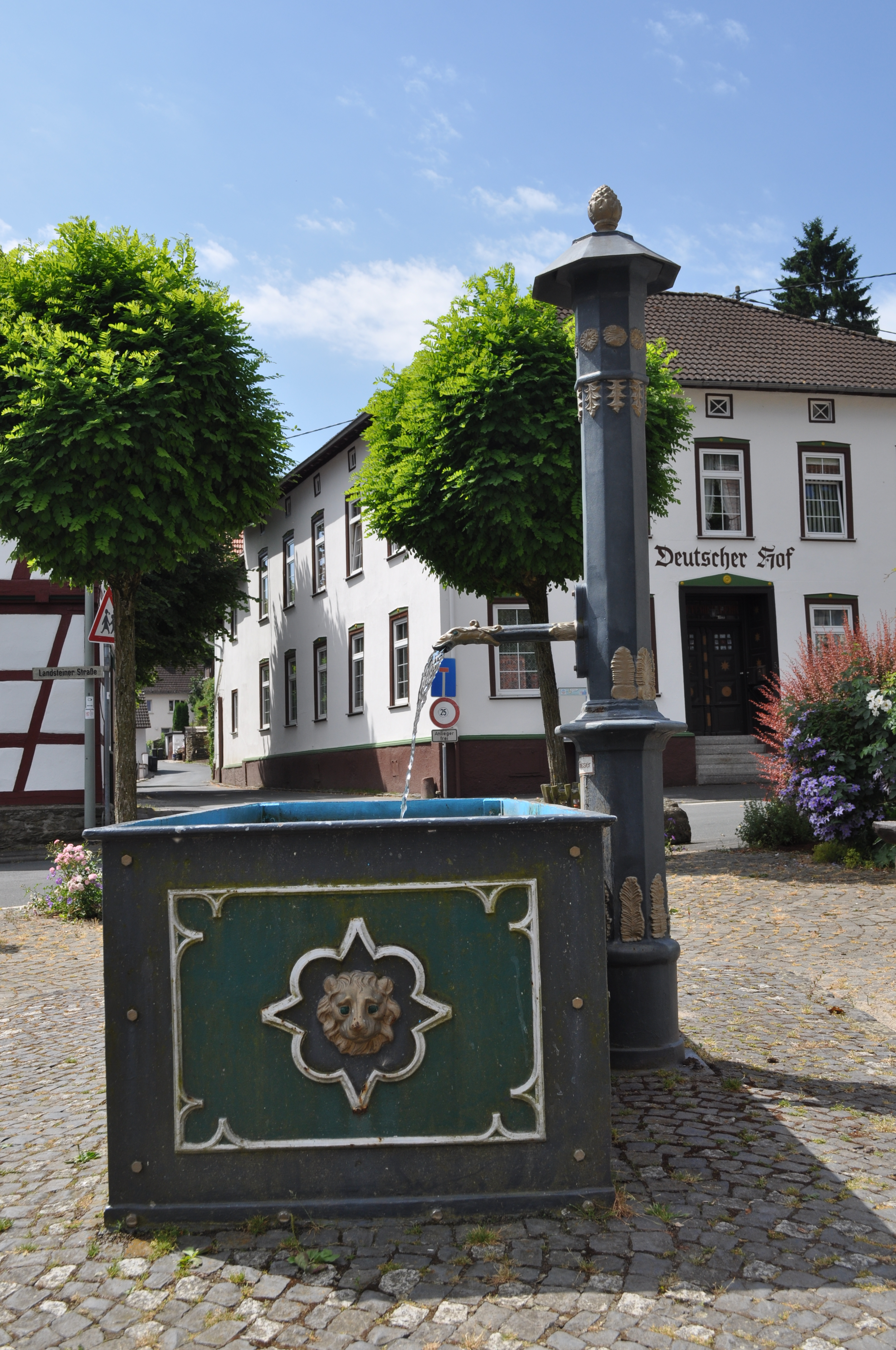 Gusseisener Brunnen in Finsternthal